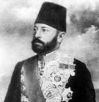 الصورة لعبد الرمن باشا اليوسف ، أمير الحاج الشامس أيام الدولة العثمانية ، وشخصية سياسية سورية بعد انتهاء عهدها